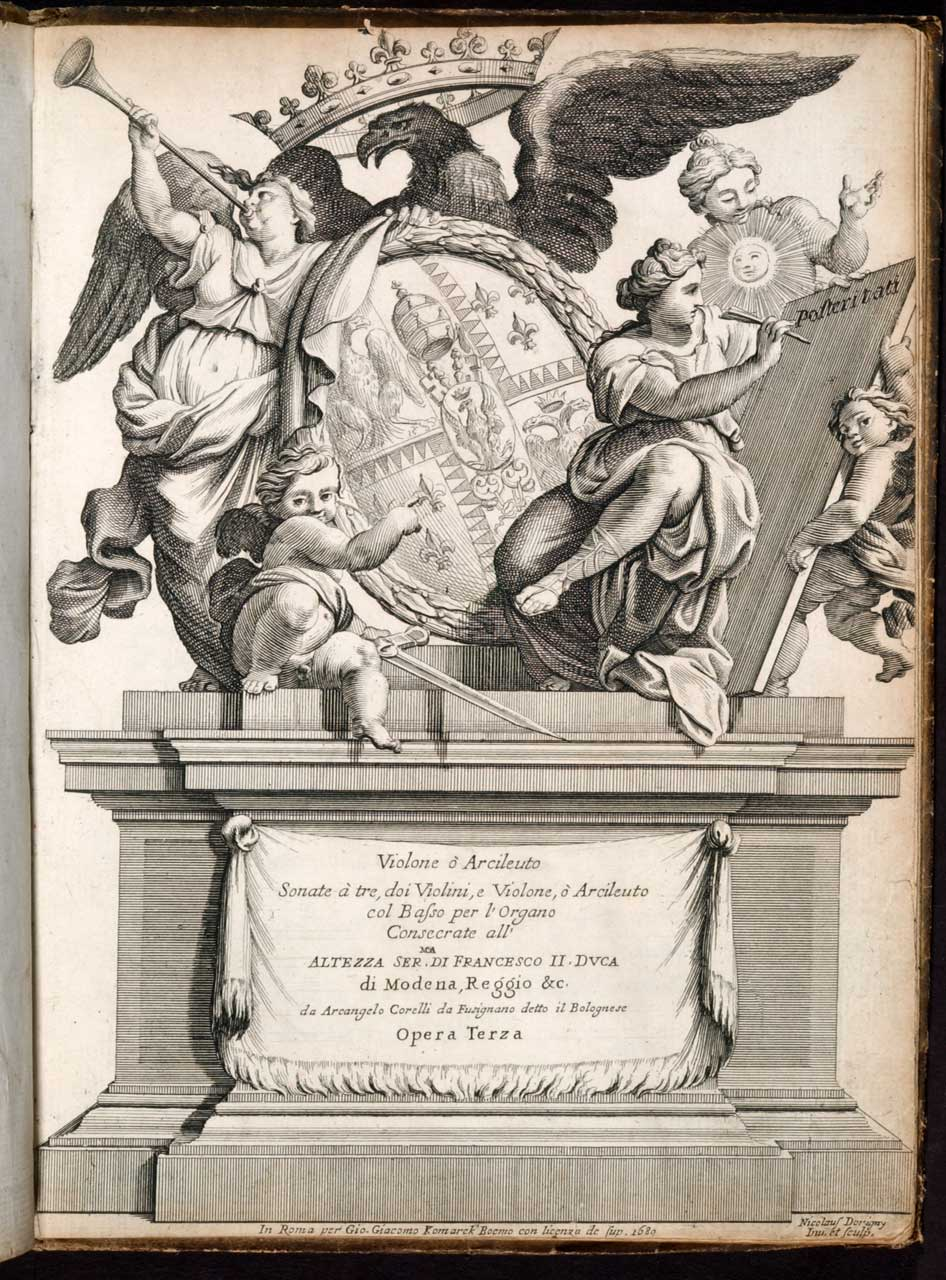 Fotokopia alegorii muzyki Corelliego nieznanego artysty XVII-wiecznego